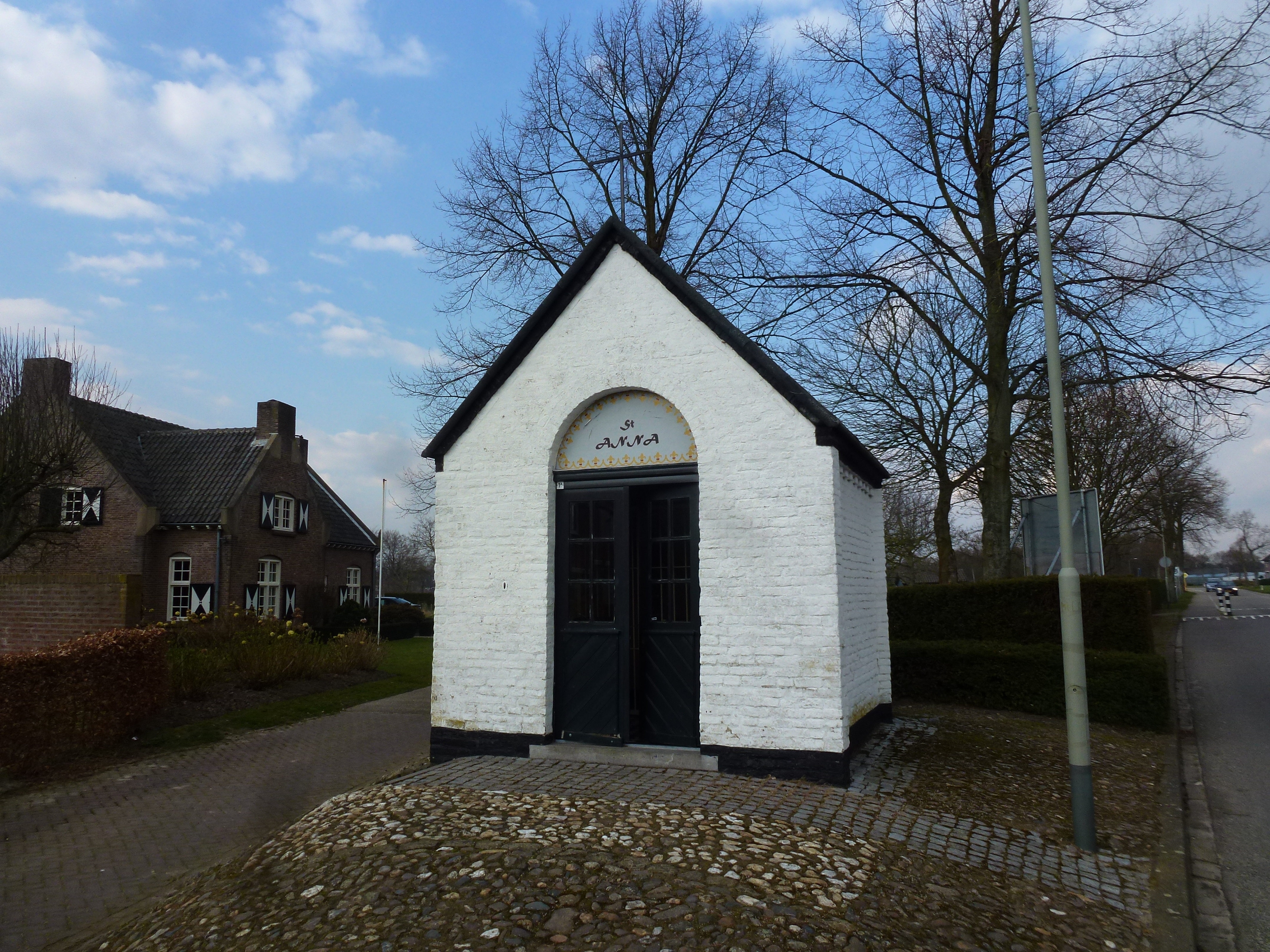 Veldkapelletje van de H. Anna, Thorn